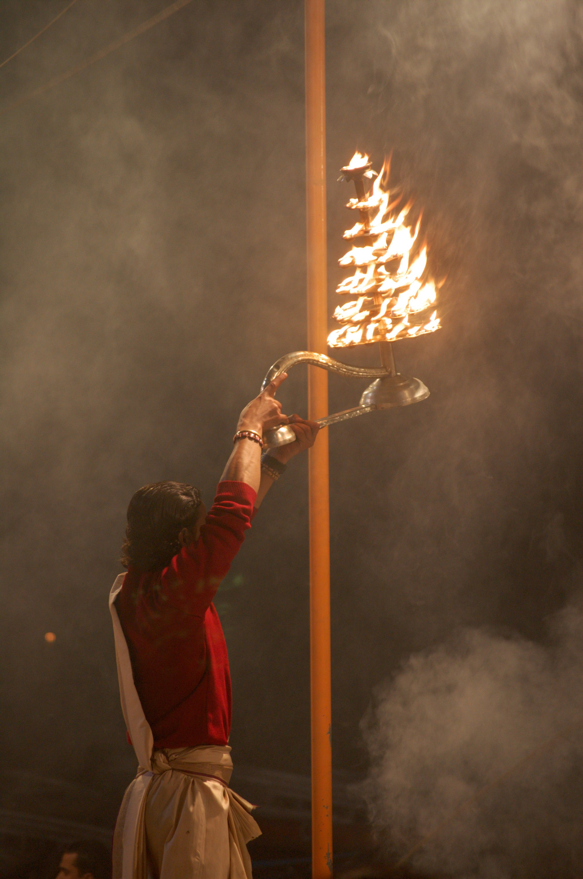 Evening Ganges aarti lamp, Varanasi.